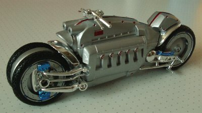 Quelle: selbst fotografiert, 07/2006 Fotograf: Späth Chr.